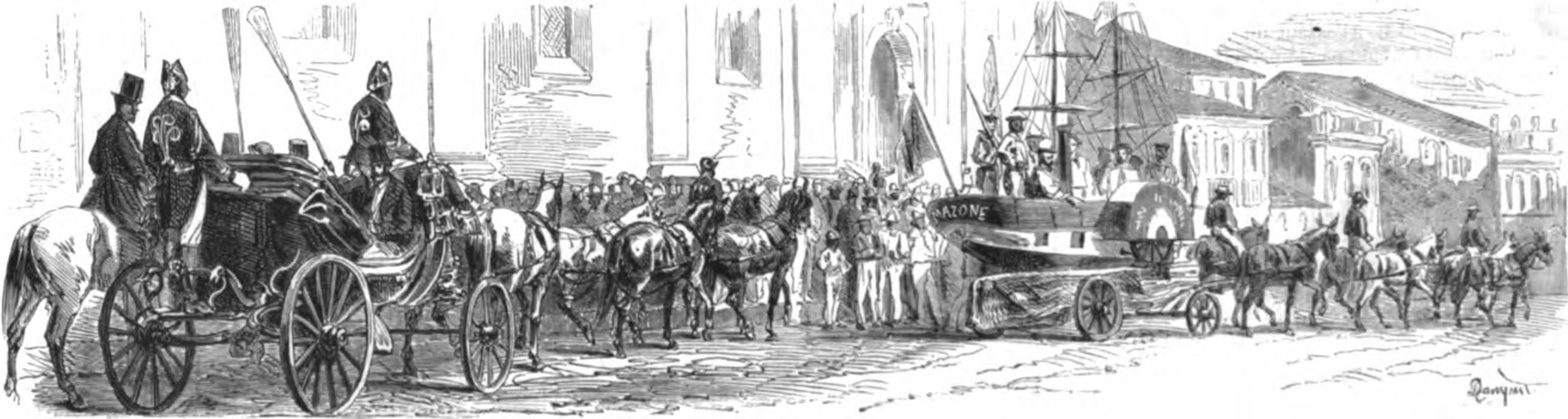 Bahia de San-Salvador (Brésil). - Fête anniversaire de L'independánce: Cavalcade organisée par MM. Luciano et Justa Ariani.